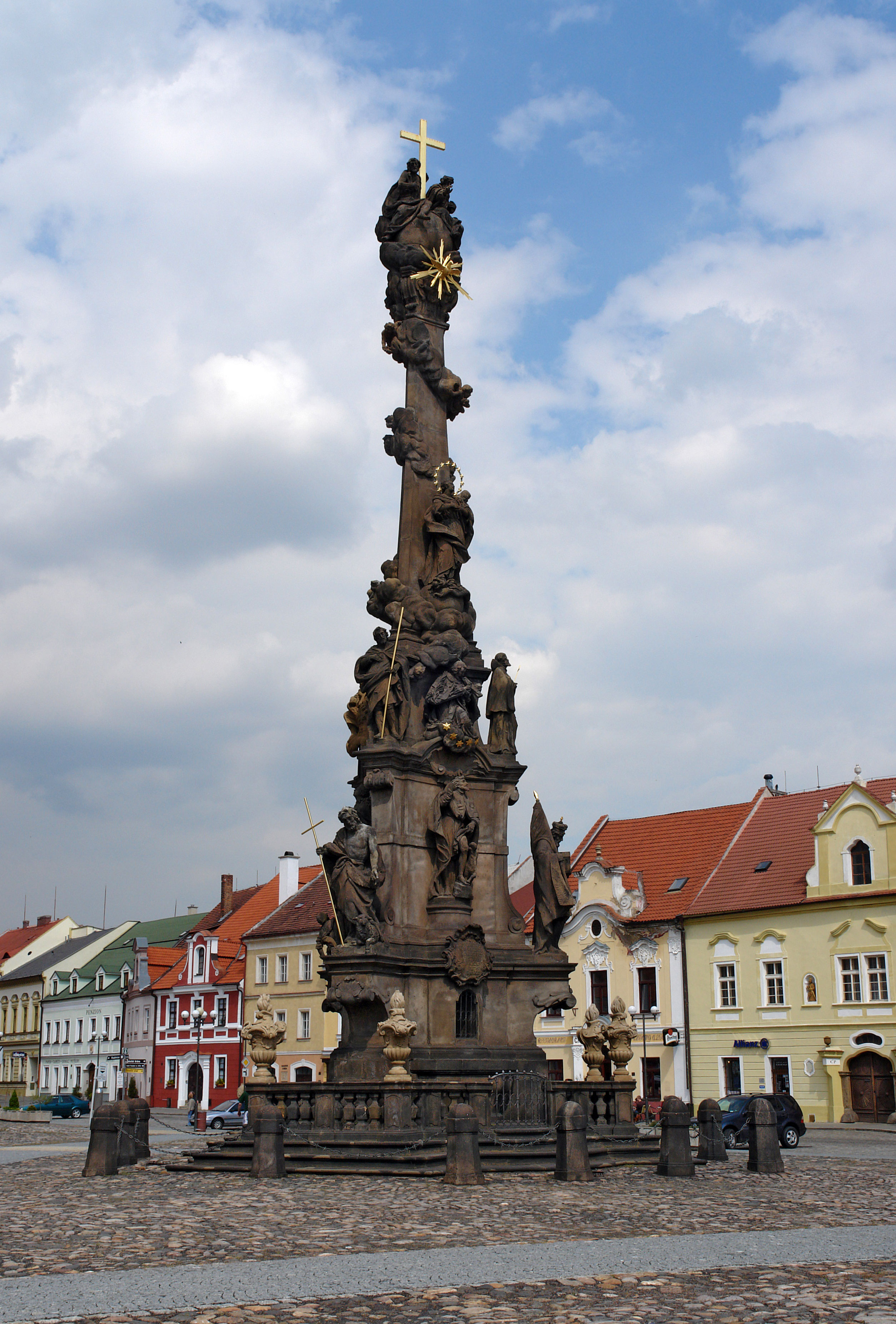 Säule der heiligen Dreifaltigkeit in Kadaň